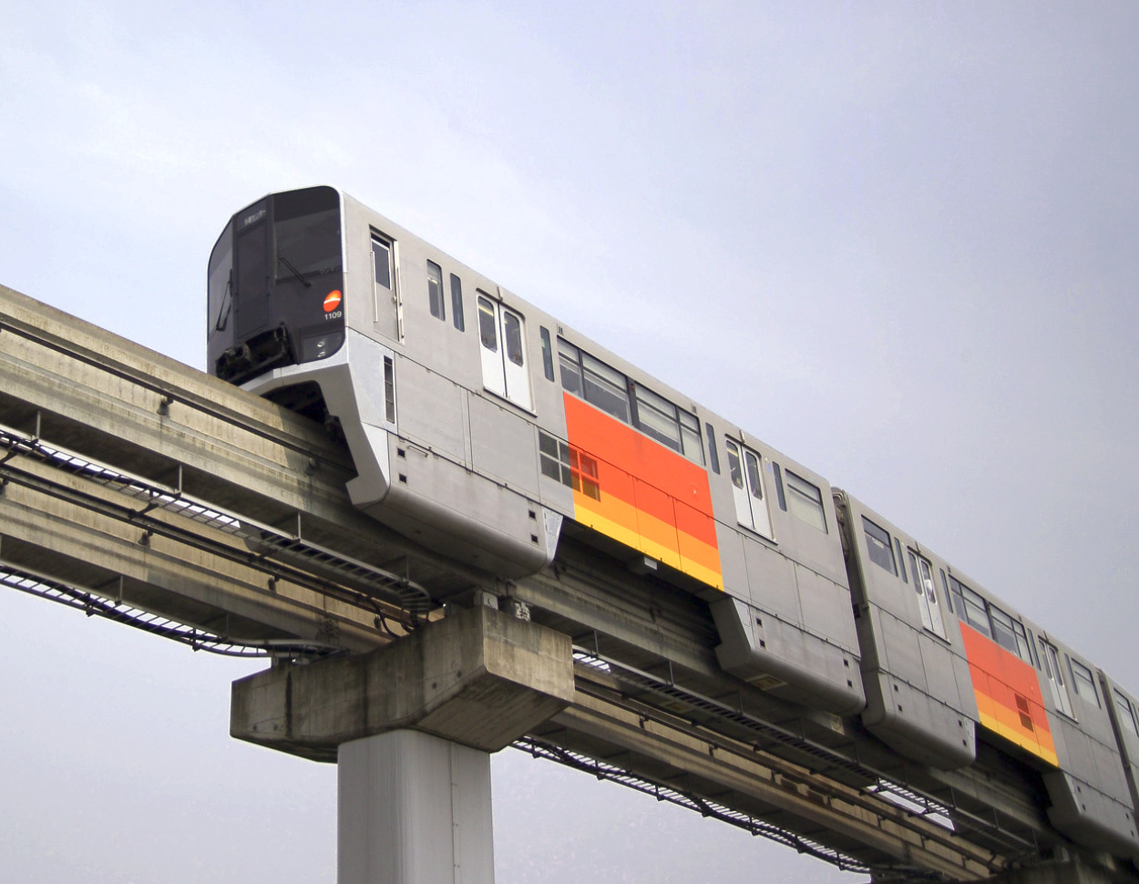 Tama Toshi Monorail Tokyo Japan